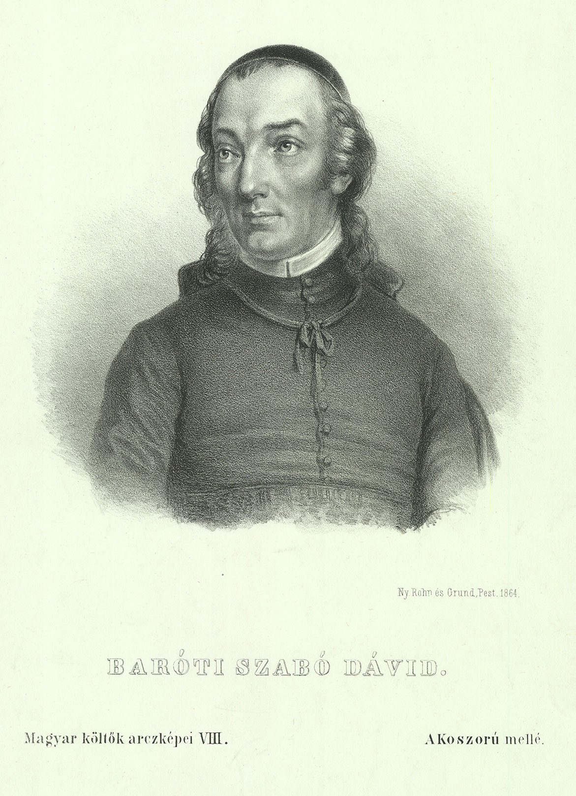 Baróti Szabó Dávid (Barót, 1739. április 10. – Virt, 1819. november 22.) magyar költő és nyelvújító, jezsuita, később világi pap és tanár.